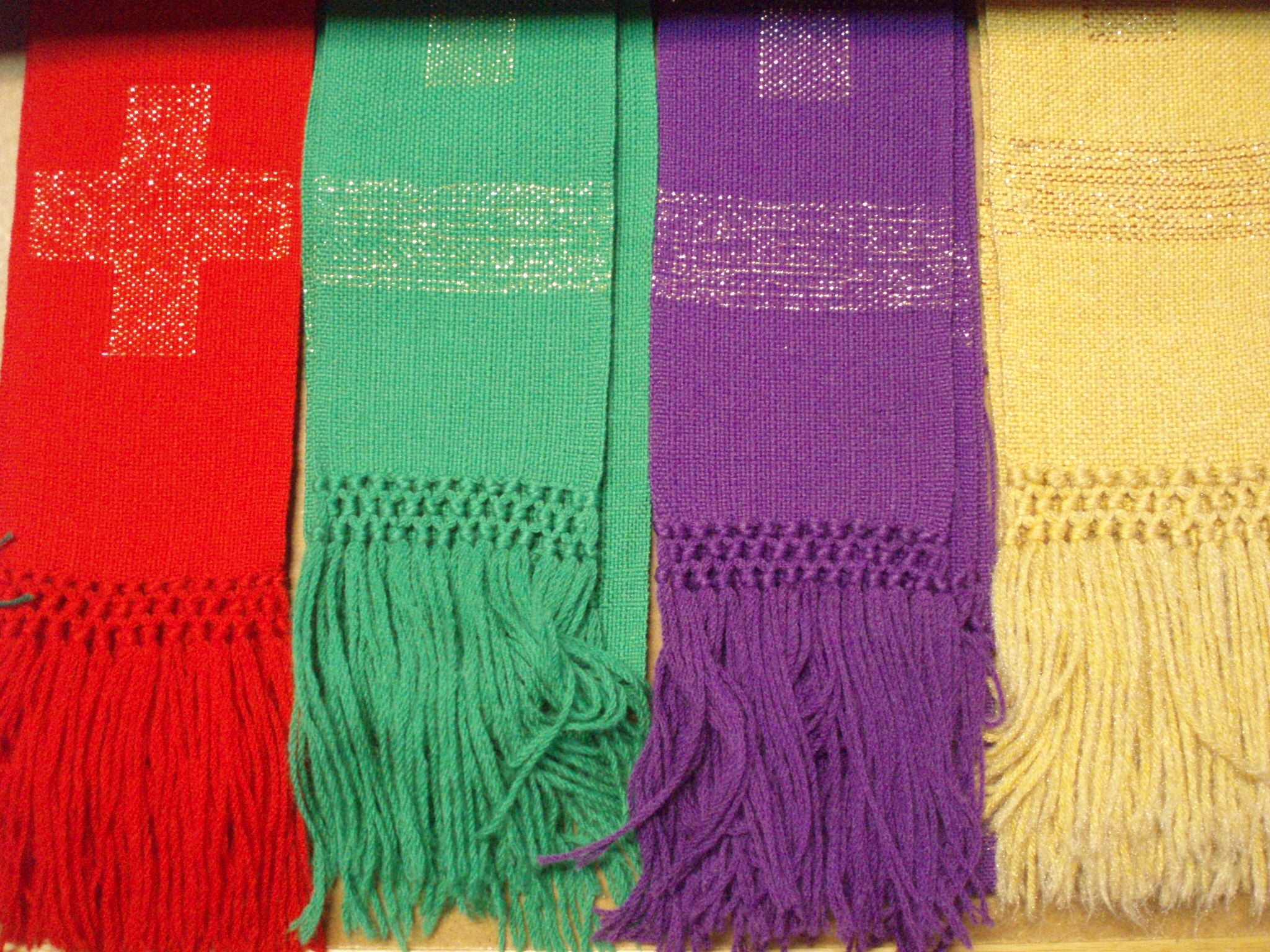 Different stoles